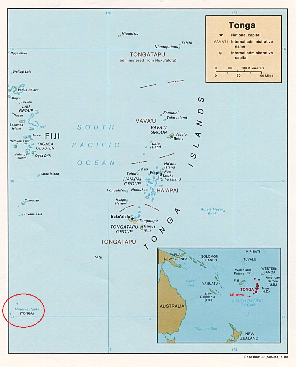 ミネルバ・リーフ（Minerva Reefs / ミネルバ共和国）の地図